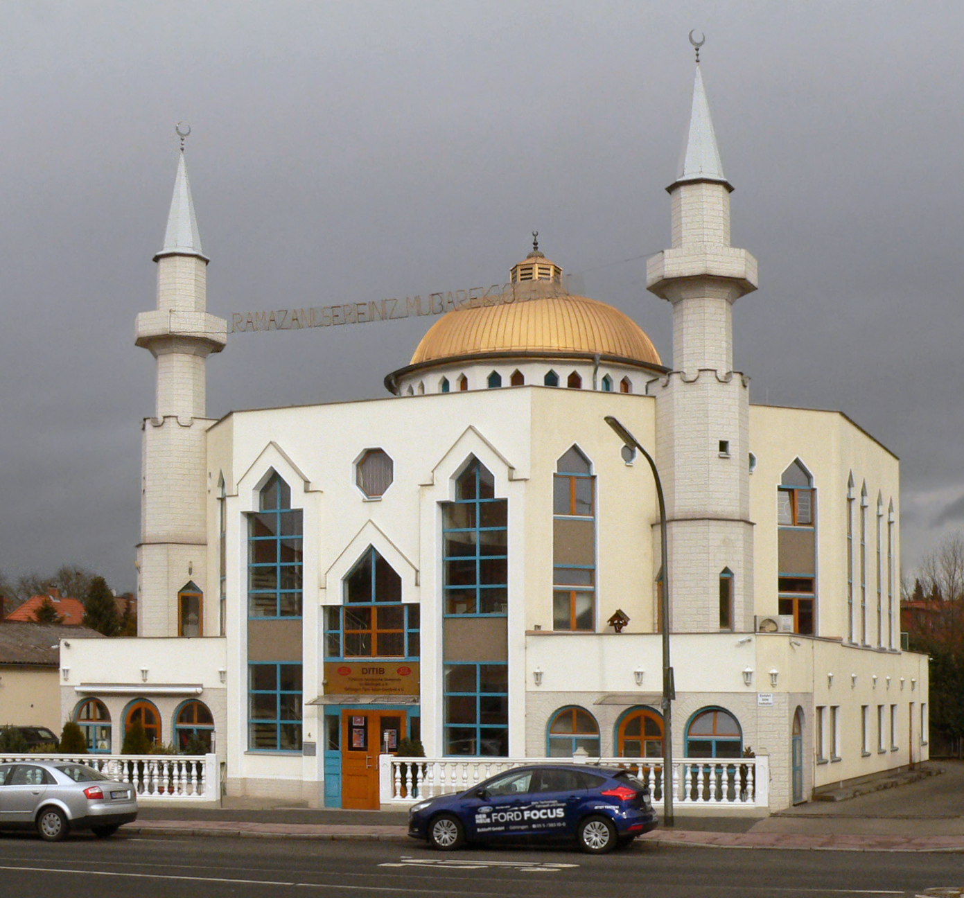 Moschee in Göttingen am Koenigsstieg